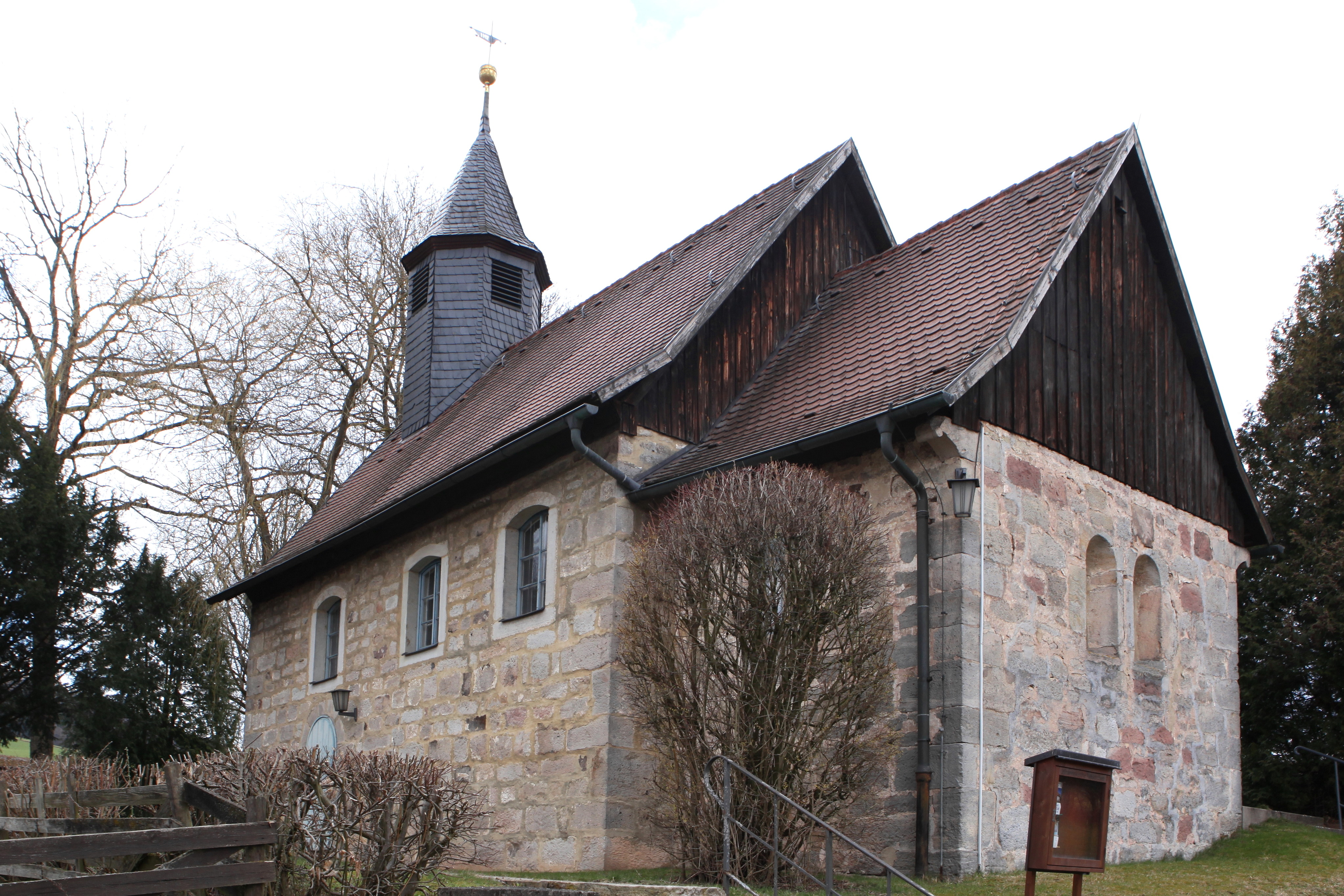 Evangelische Johanniskirche in Neukirchen, Gemeinde Lautertal, Landkreis Coburg